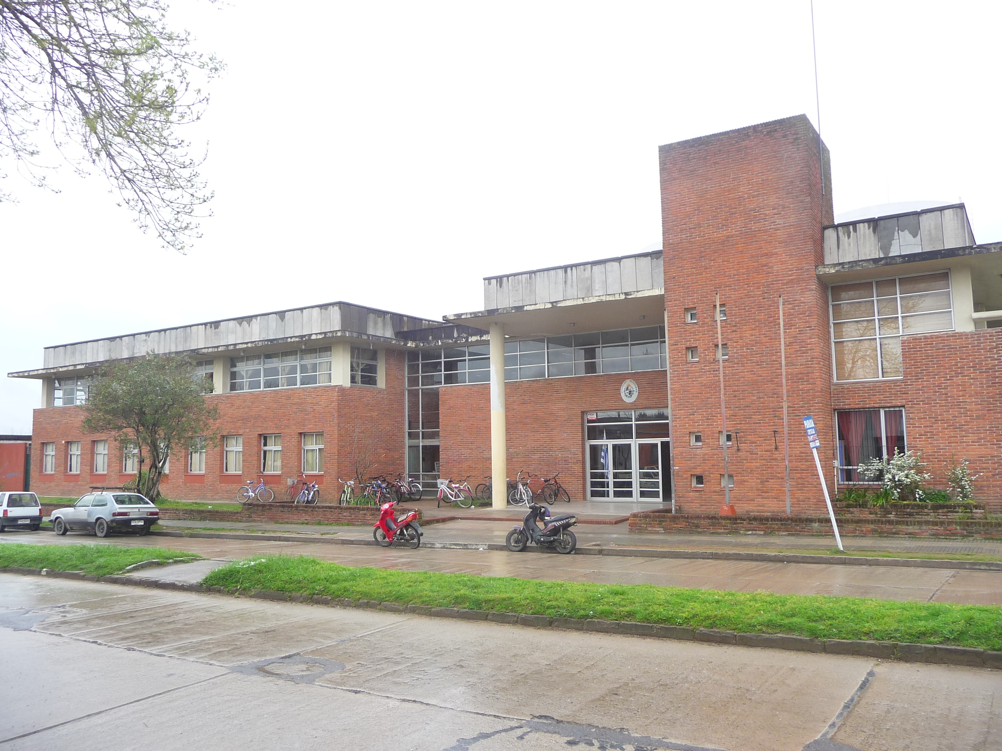 Fachada del liceo n° 2 de Rocha "Prof. Rosalío A. Pereira".